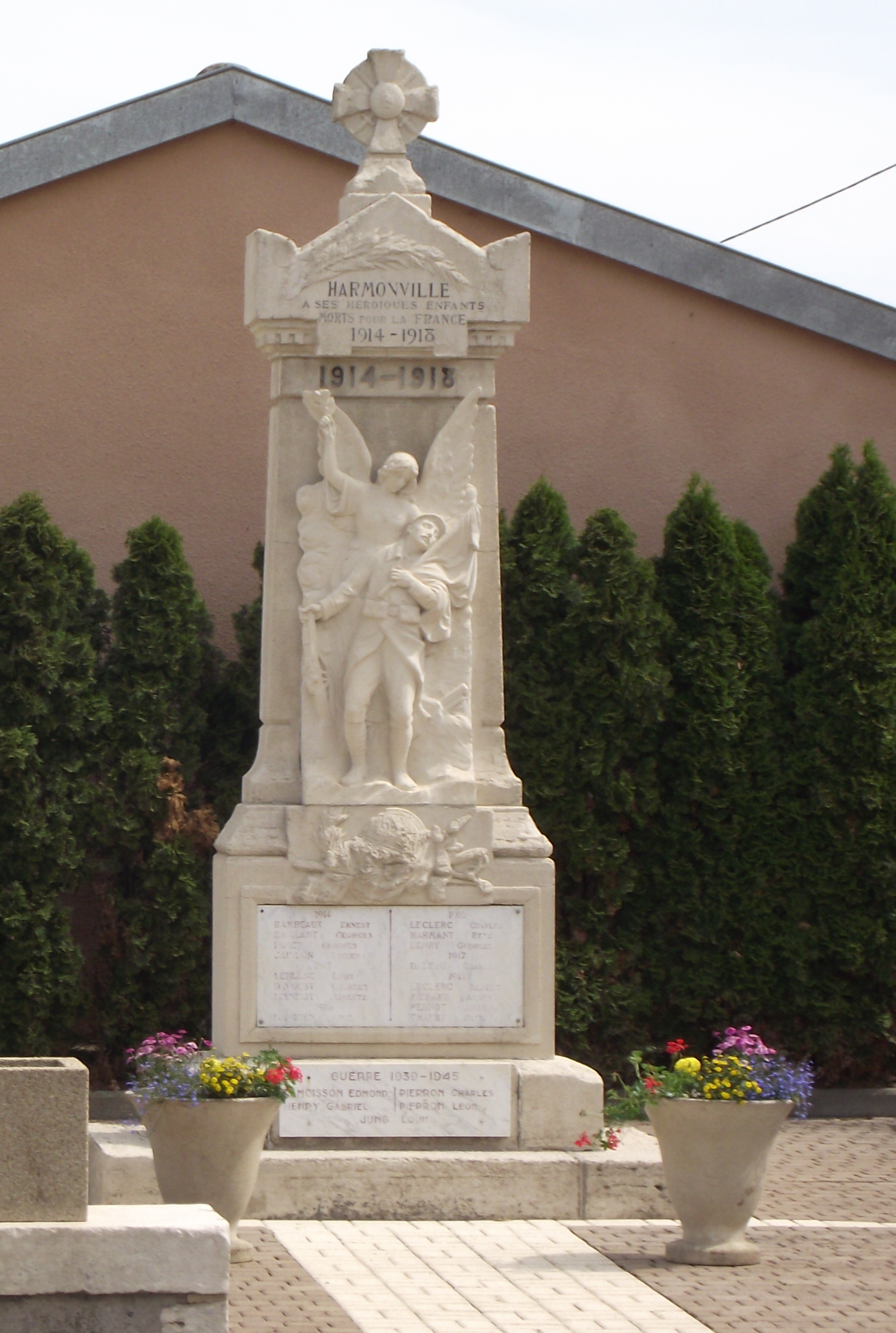 Harmonville à ses héroïques enfants Morts pour la France 1914-1918 et 1939-1945